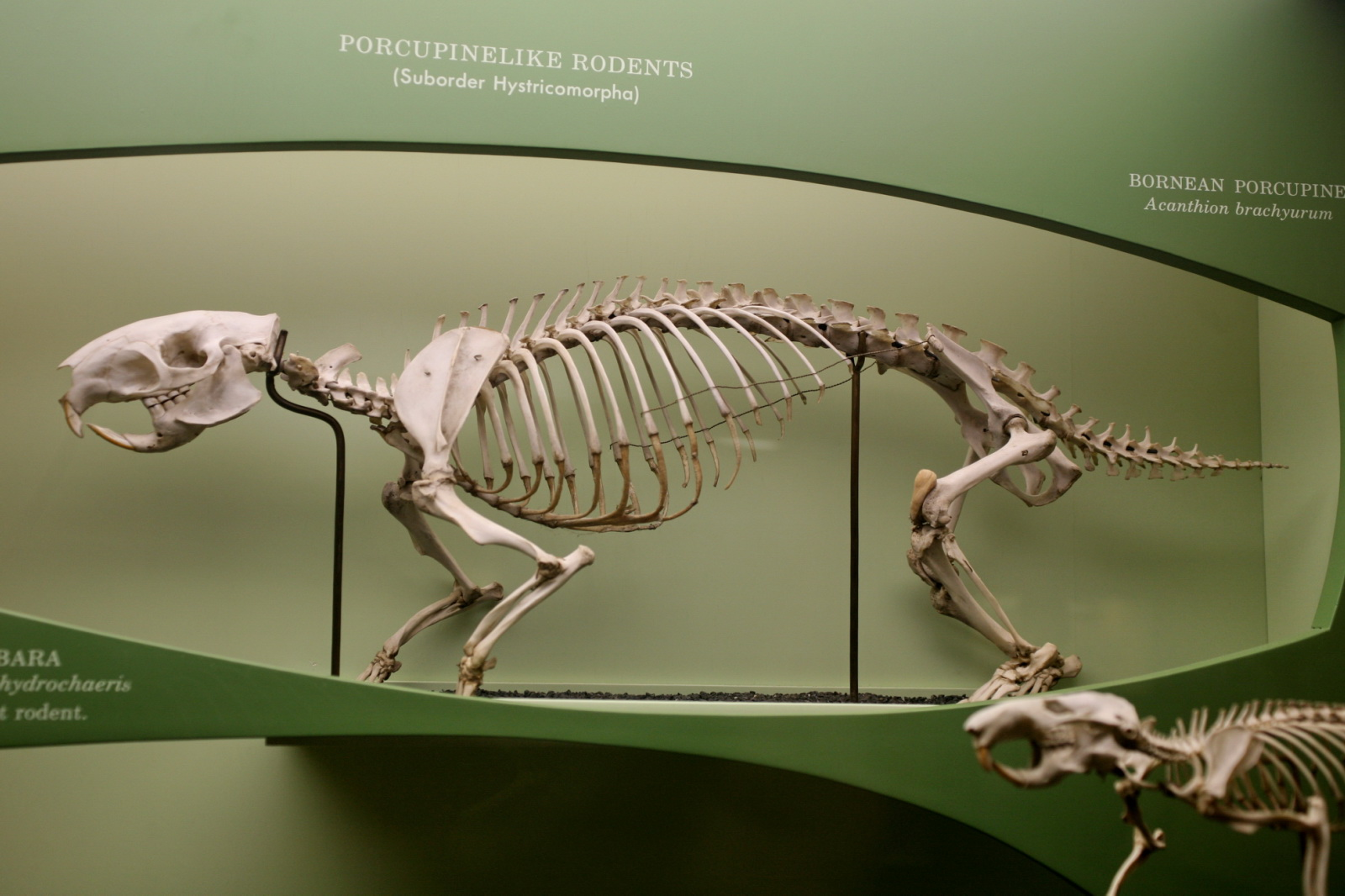 A porcupine endoskeleton